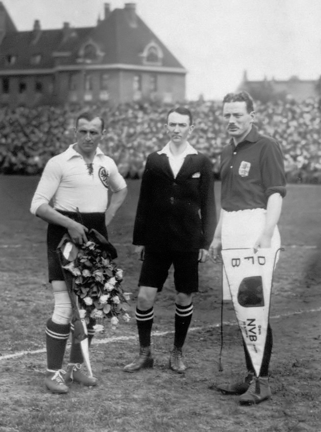 De Duitse aanvoerder en de Nederlandse aanvoerder Eb van der Kluft (Blauw Wit) na het uitwisselen van vaantjes en bloemen. In het midden de Zweedse scheidsrechter Björklund. Duitsland - Nederland (0-0), gespeeld op 10 mei 1923 op het terrein van Victoria (Hoheluft) te Hamburg. 10 mei 1923